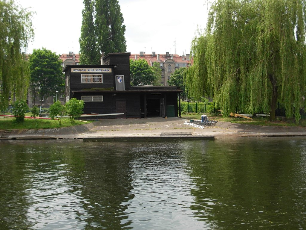 Bydgoski Klub Wioślarek